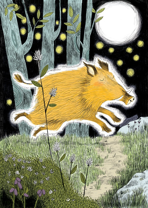 GULLINBURSTI - he was a golden boar made by the dwarfs BROKKR and EITRI. GULLINBURSTI was made from pigskin and thousands of pieces of gold wire. He was given to the god FREYA. GULLINBURSTI was faster than any horse over water and though air. He had golden rays that shone like the Sun, and made plants grow everywhere.